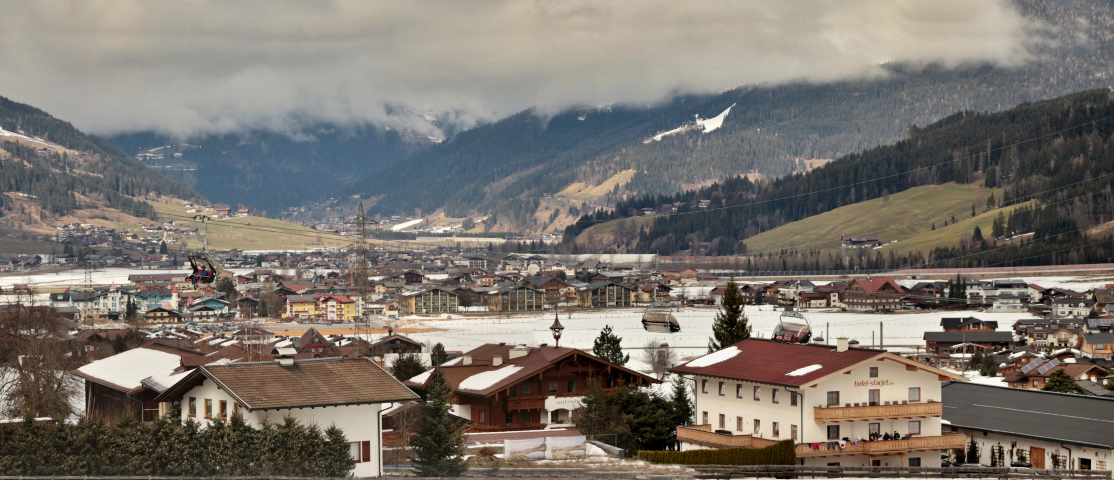 Flachau